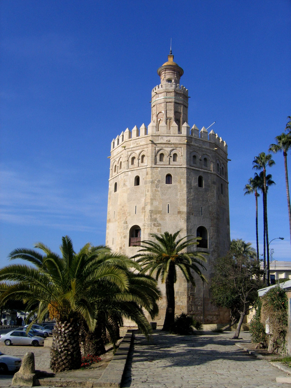 Torre del Oro, Sevilla